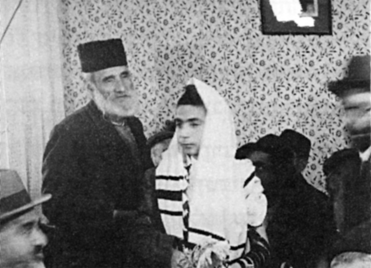 הרב צדקה חוצין בהנחת תפילין לבנו של הרב יהודה צדקה